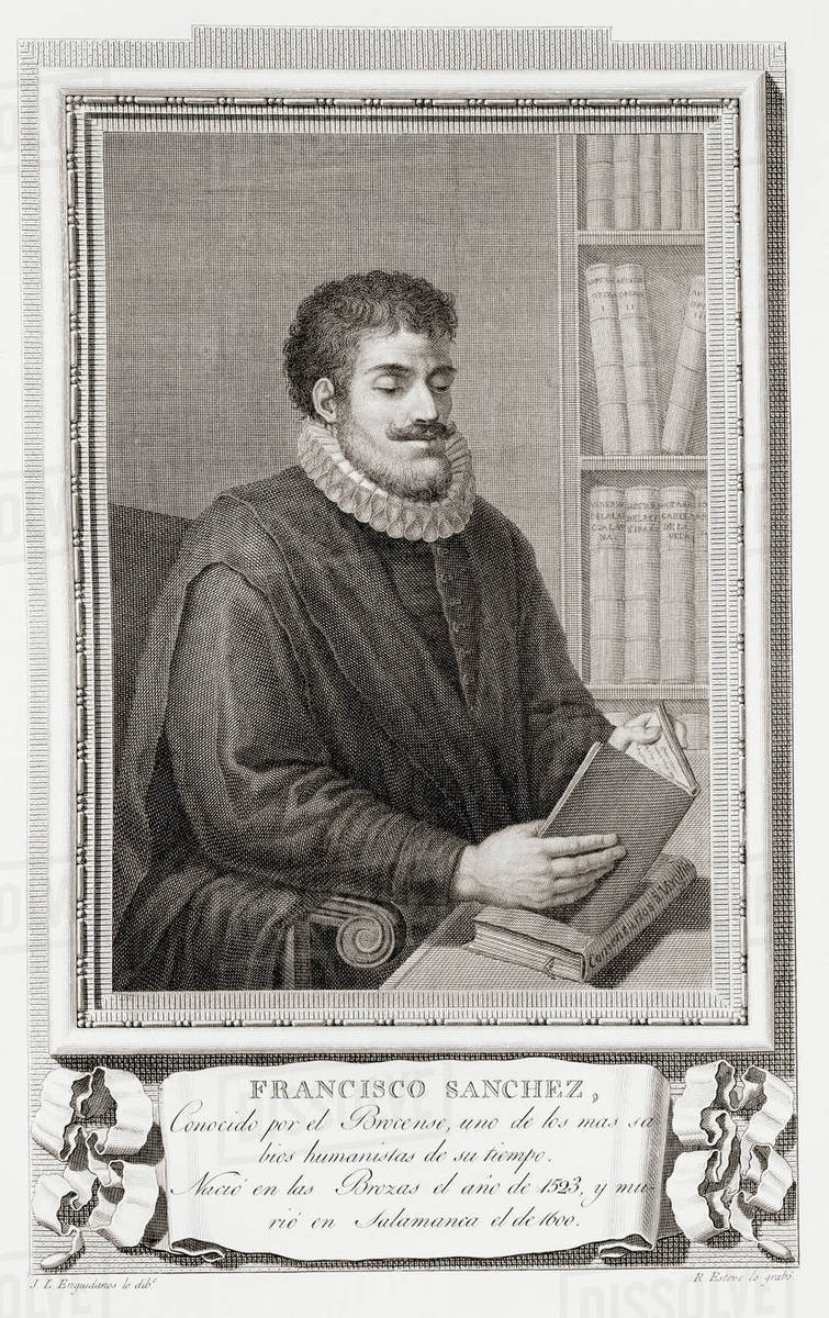 Retrato de Francisco Sanchez.